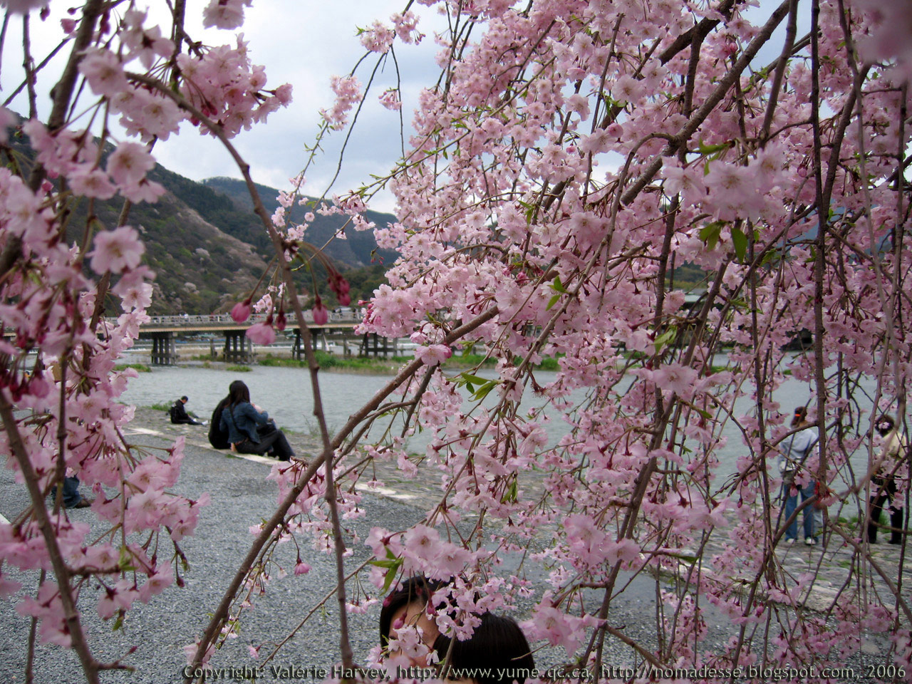 Auteure du fichier